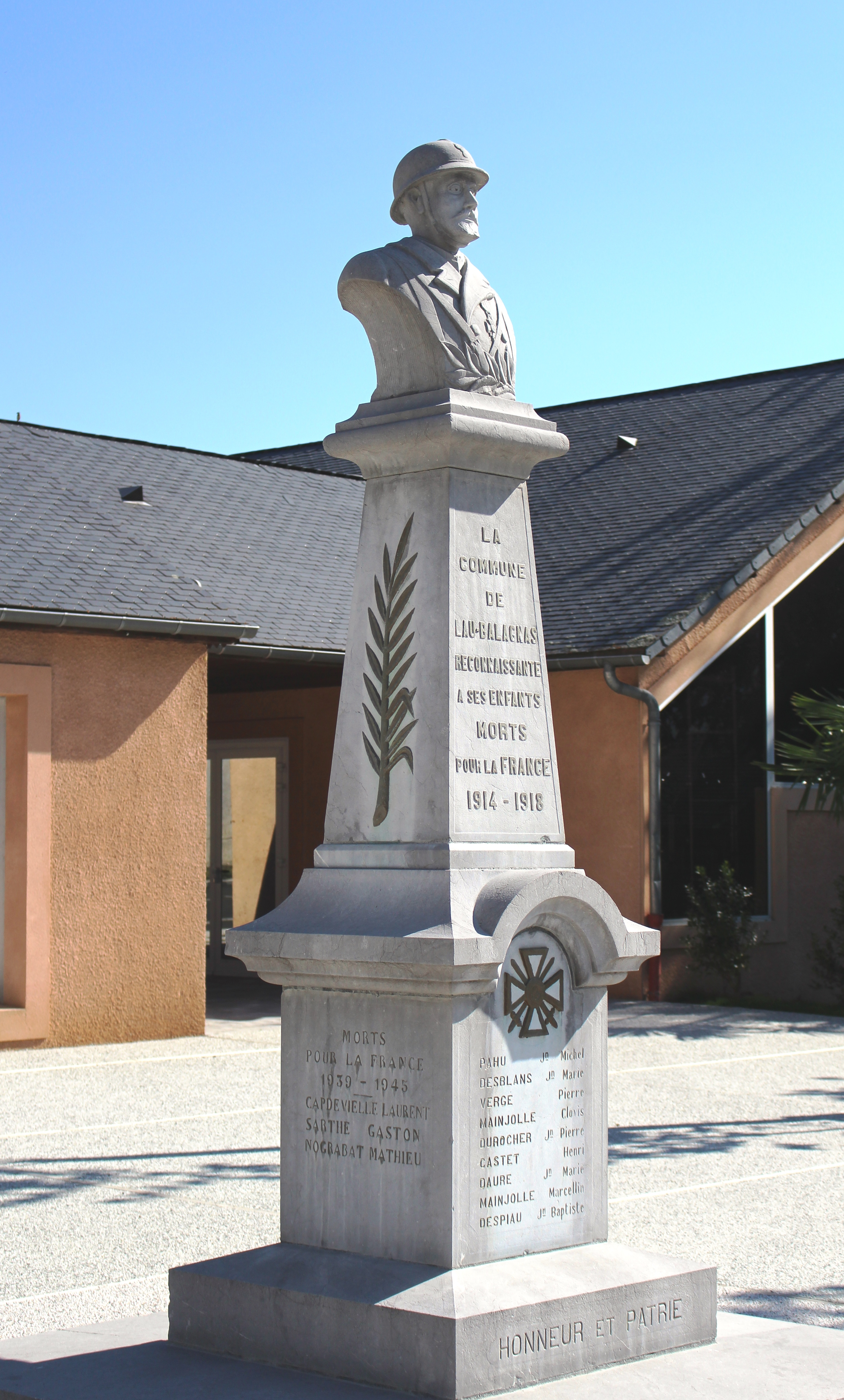 Monument aux morts de Lau-Balagnas (Hautes-Pyrénées)